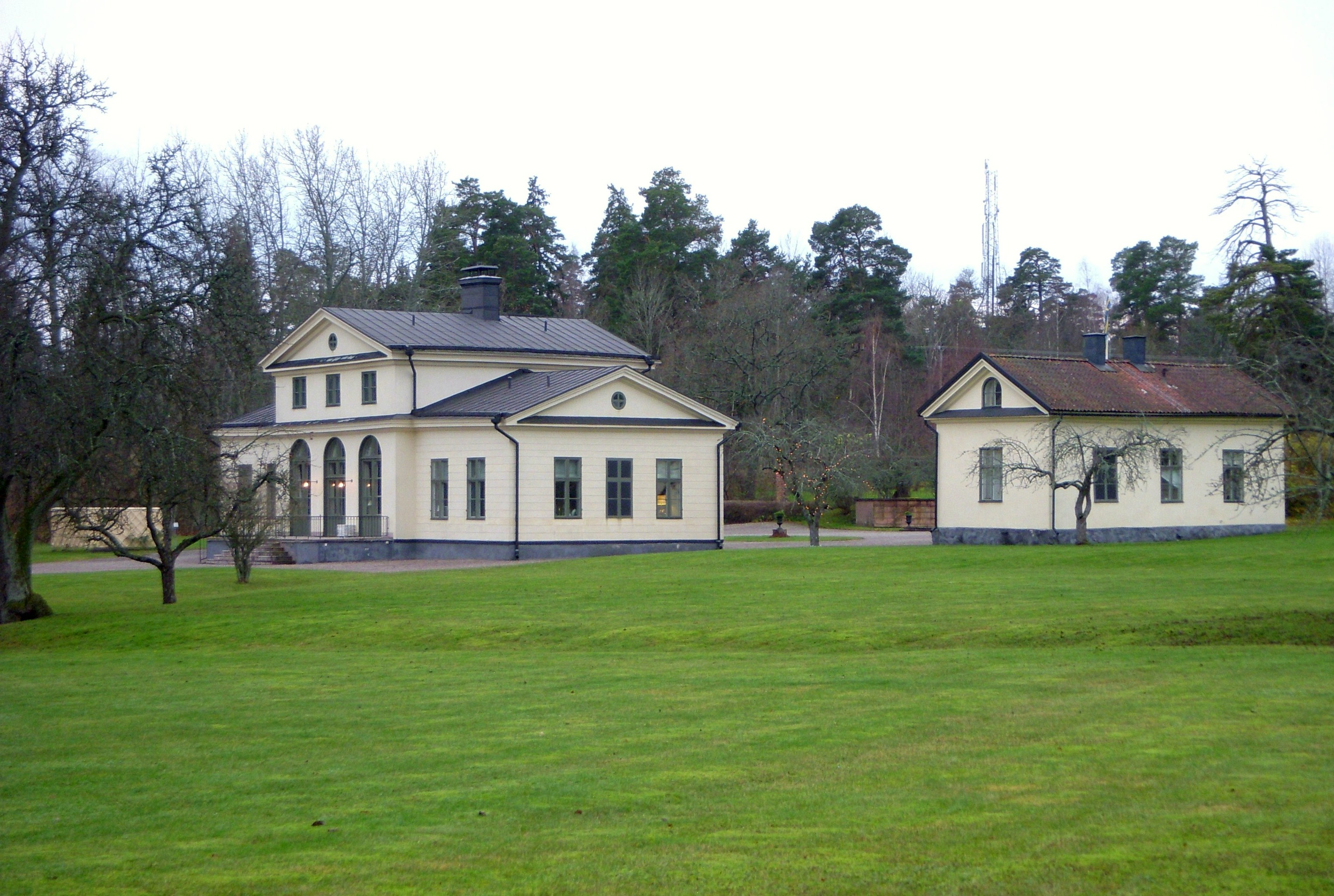 Byggnaden "Vilan" på Drottningholm, arkitekt Louis Jean Desprez, 1792